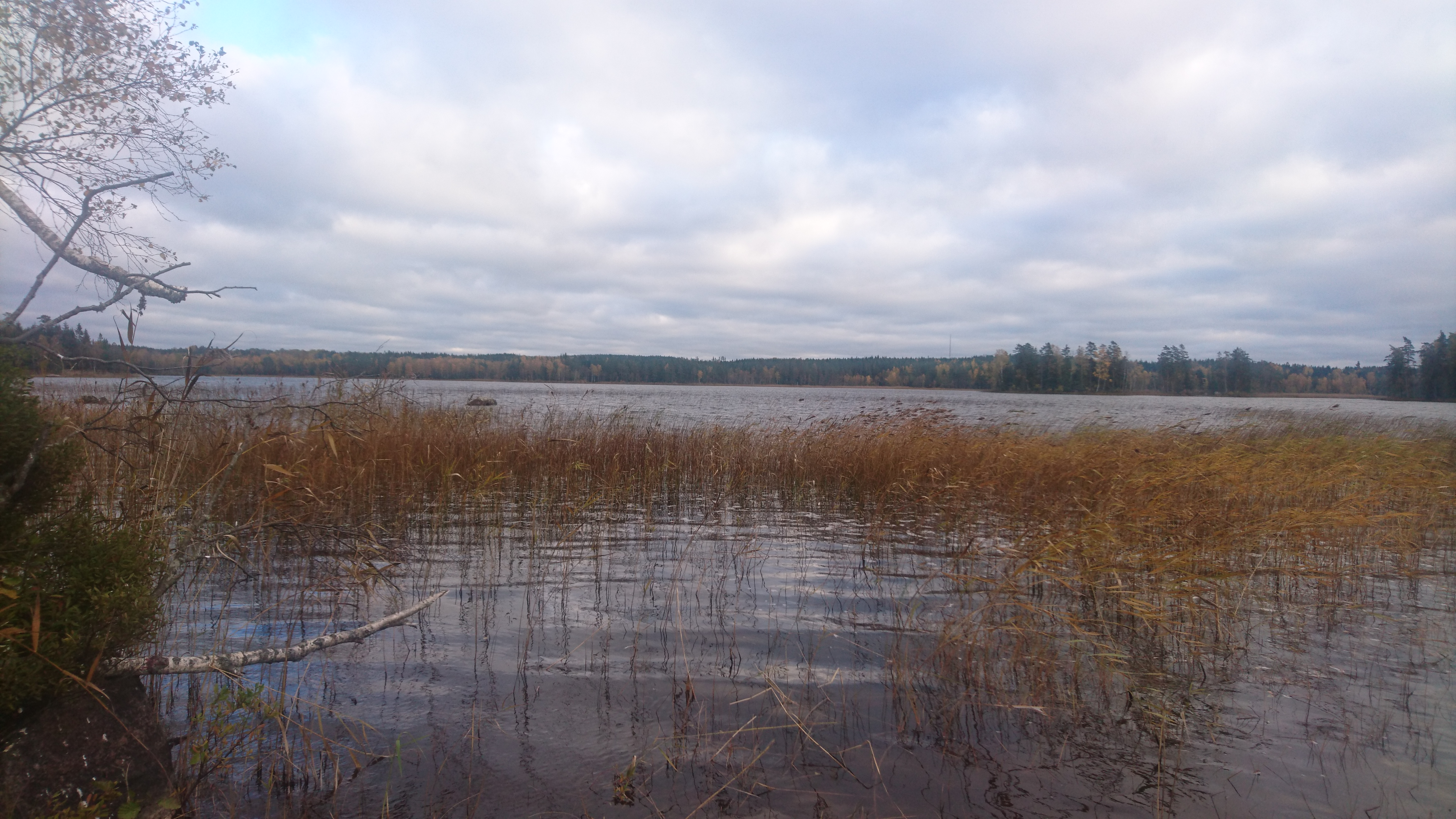 Vallsjön utanför Hova, på hösten